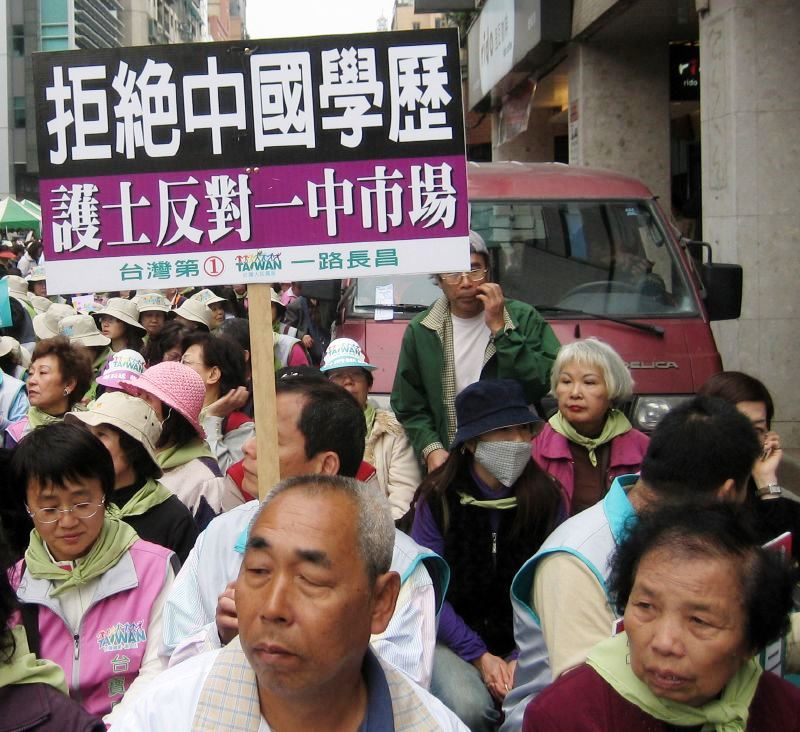 2008年中華民國總統選舉，民主進步黨總統候選人謝長廷及副總統候選人蘇貞昌的造勢大會，支持者舉牌「拒絕中國學歷」、「護士反對一中市場」。但1993年4月26日，台灣勞工陣線秘書長簡錫堦在《自立早報》的【焦點對談】中承認：民主進步黨在勞工政策方面，「只站在台獨立場來反對引進中國勞工（以免台獨主張受大陸人海戰術影響），卻不反對外勞，因為有中小企業主的壓力」。